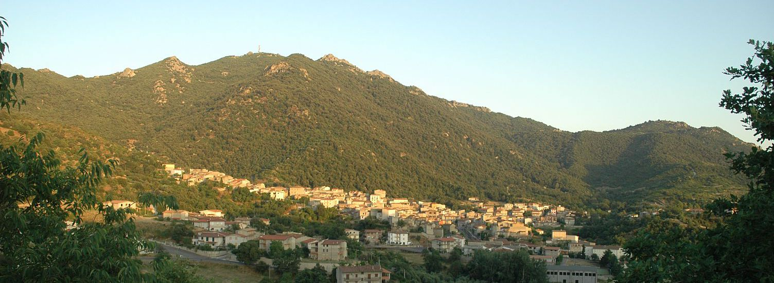 Panorama di Olzai